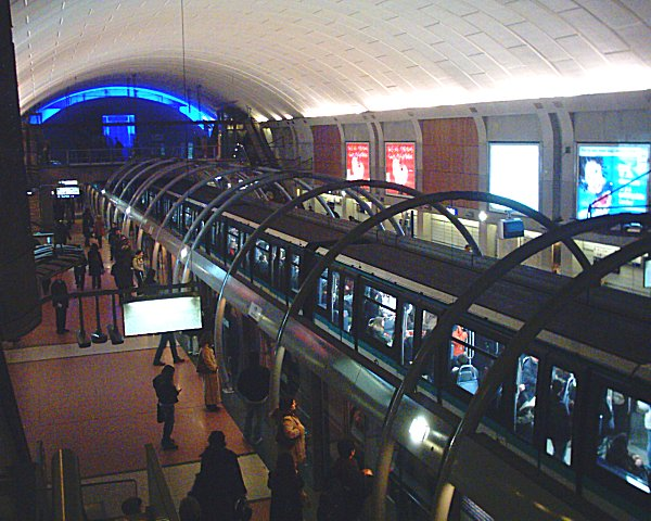 Station Chatelet du Métropolitain de Paris.